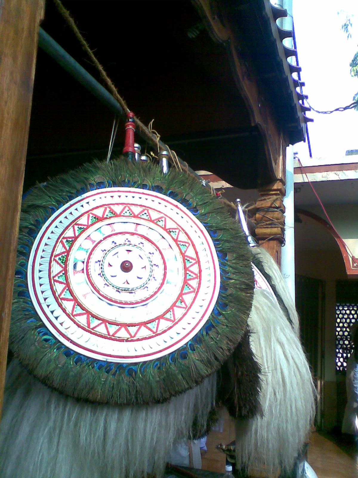 ആലവട്ടത്തിന്റെ ചിത്രം